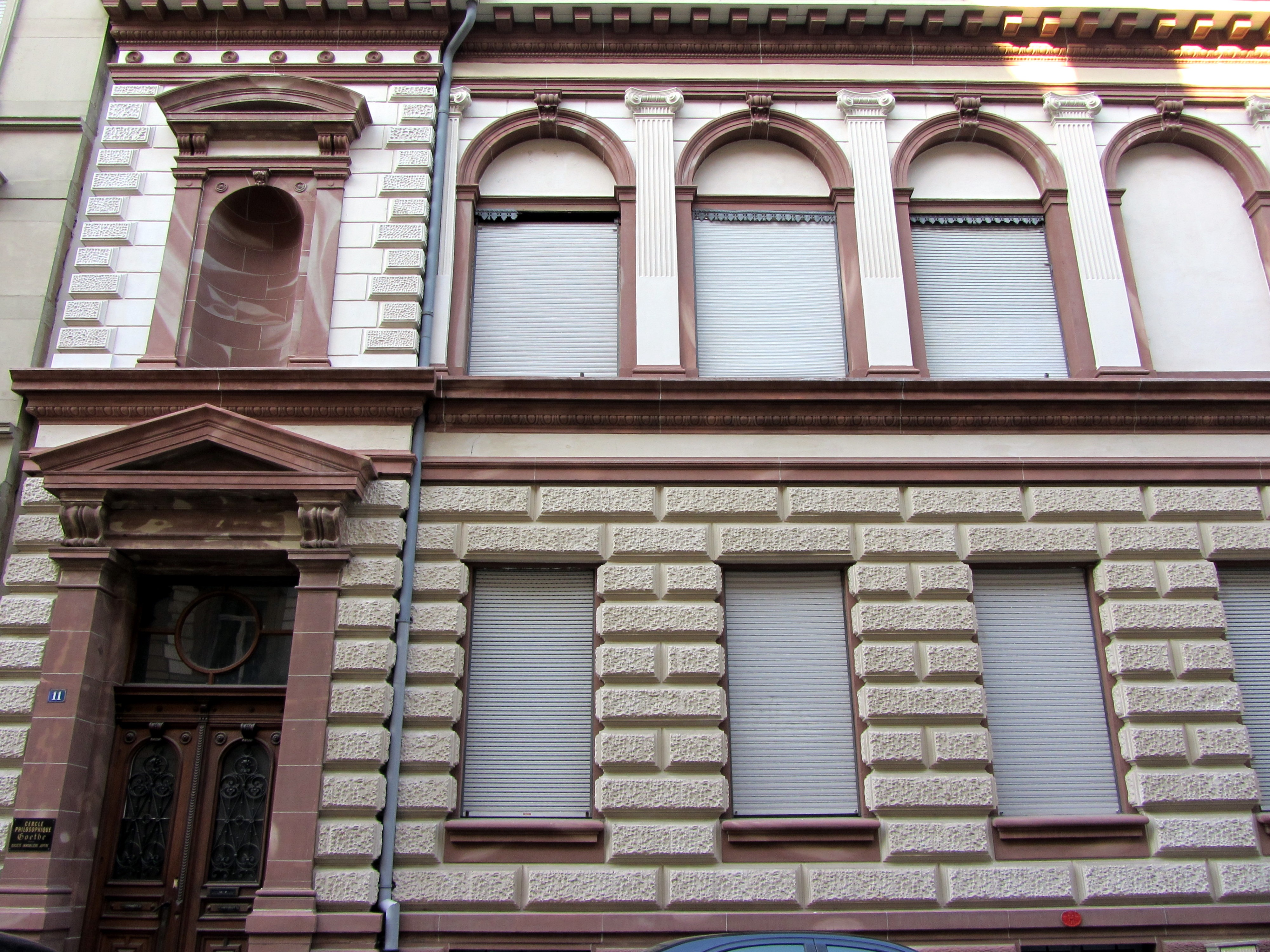 La façade sur rue ne comporte pas de signes distinctifs de la nature de l'édifice, mais se singularise tout de même par son parti d'horizontalité néo-Renaissance qu'accentue la toiture en terrasse. Le RC, entièrement traité en bossages à chanfreins, comporte sept fenêtres rectangulaires et l'étage autant de baies en plein-cintre, séparées par les pilastres d'ordre ionique. Deux avant-corps latéraux superposent un portail à fronton rectangulaire et une niche concave sous un fronton semi-circulaire ; dans le projet, ces niches devaient abriter les statues d'Hercule et d'Apollon, symboles maçonniques de la Force et de la Beauté. Source : dictionnaire des monuments historiques (La Nuée Bleue)